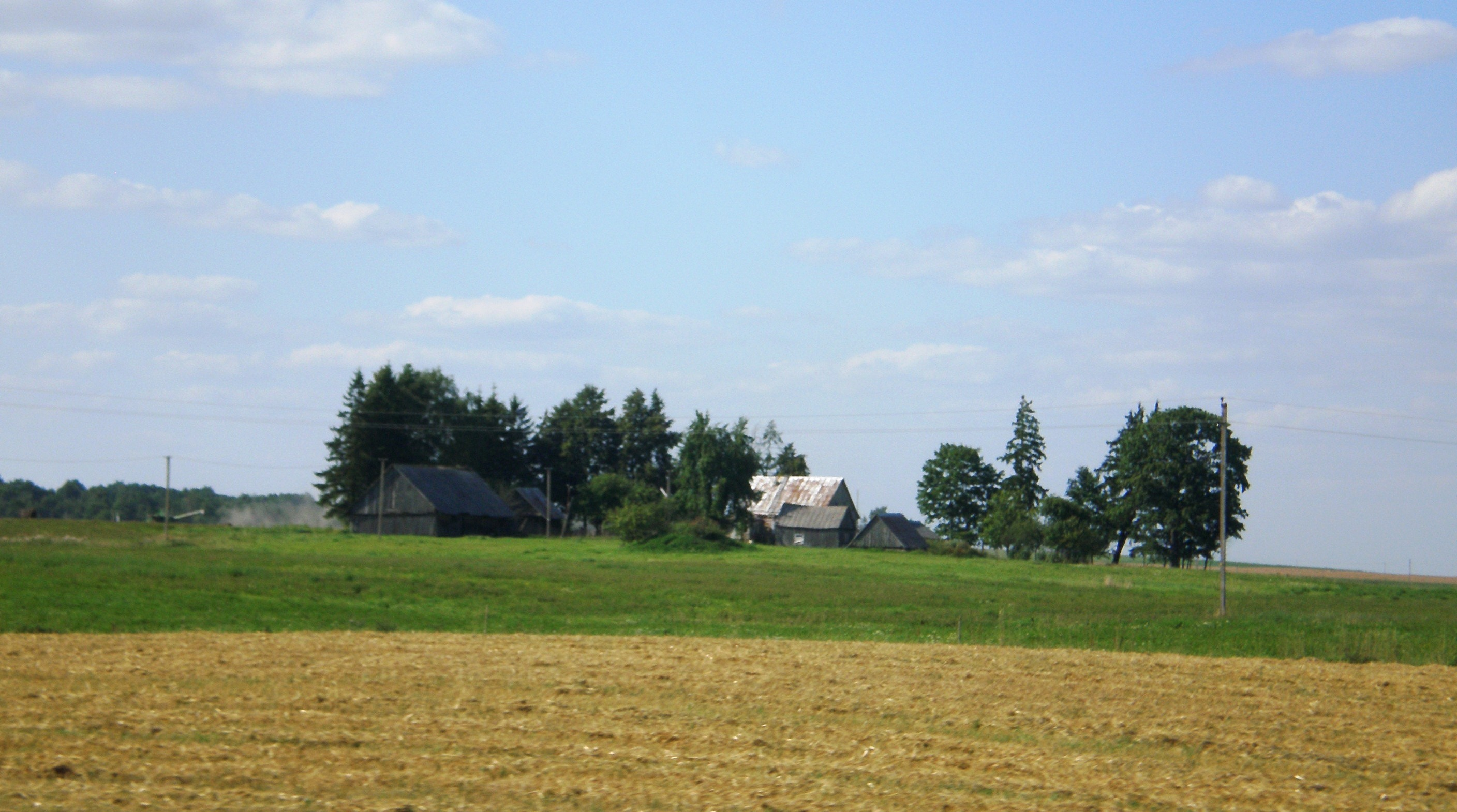 Lesčiukai, Kėdainių raj.